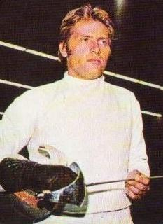 Lo schermidore Michele Maffei